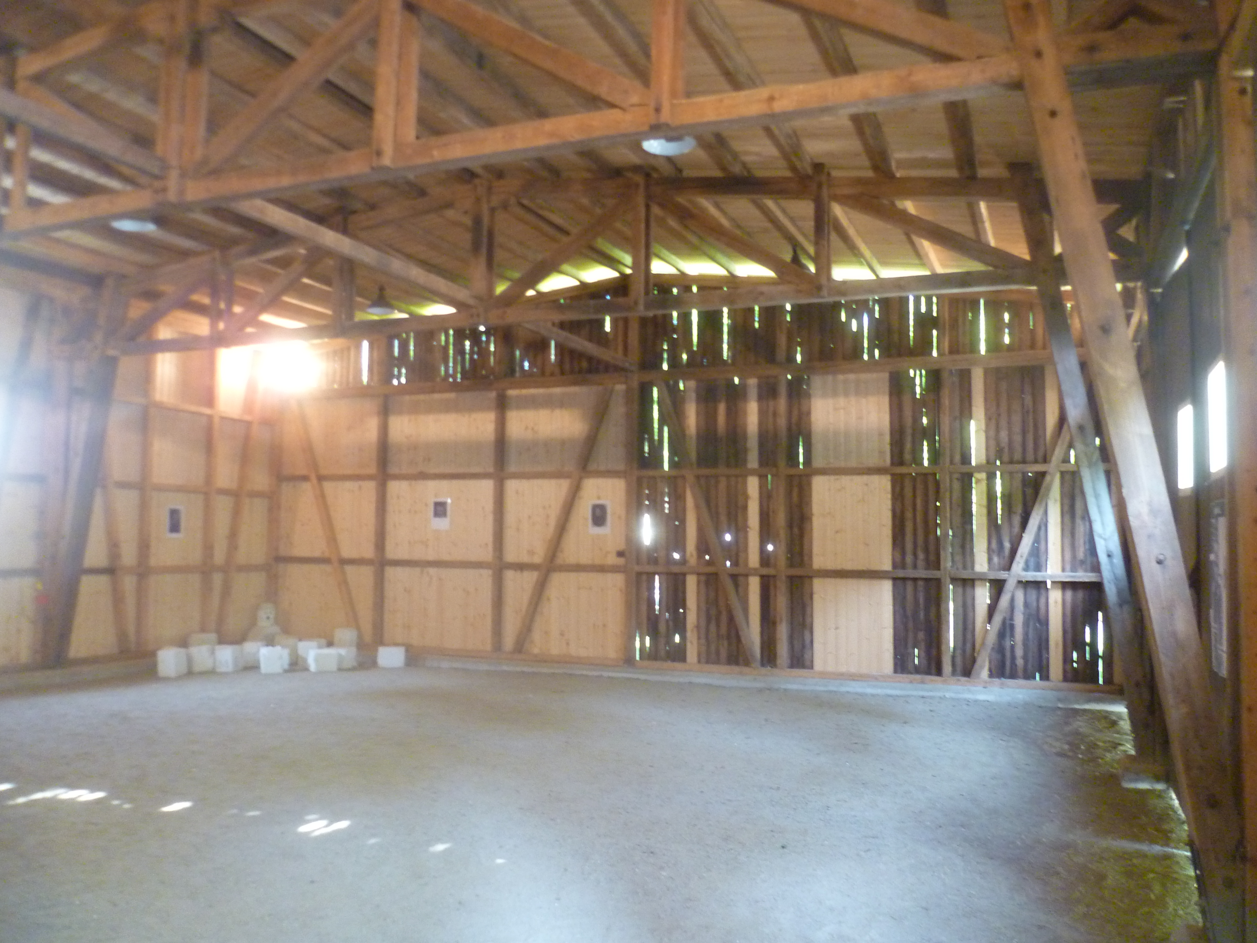 Innenansicht der Gekrat-Garage